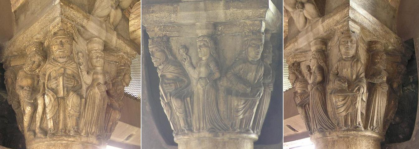 Capitello con le storie di Davide, nella sala dei Torresani, all'ultimo piano visitabile della Ghirlandina.